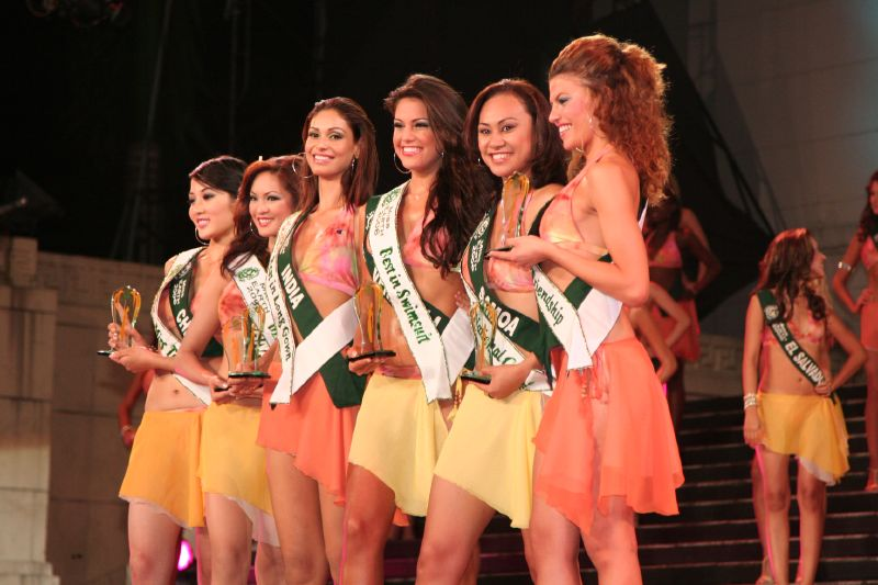 awards cmy